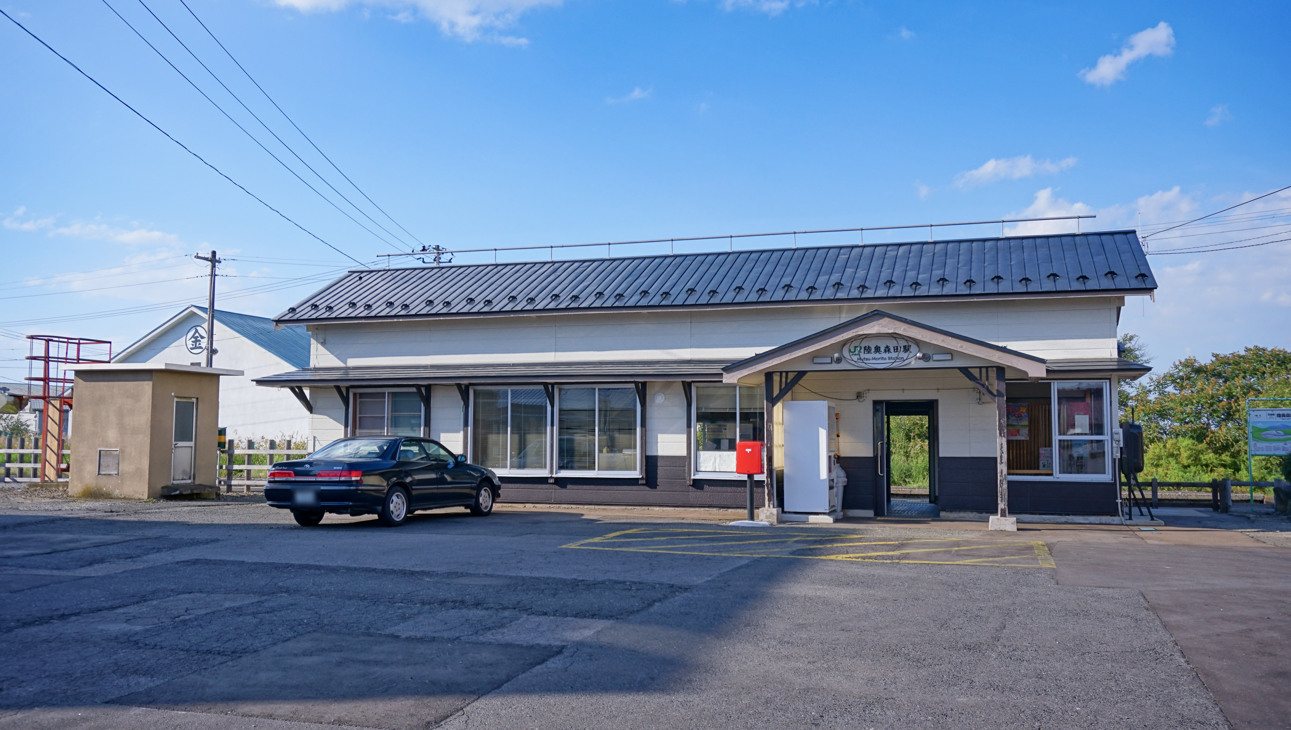 五能線 陸奥森田駅（青森県つがる市）